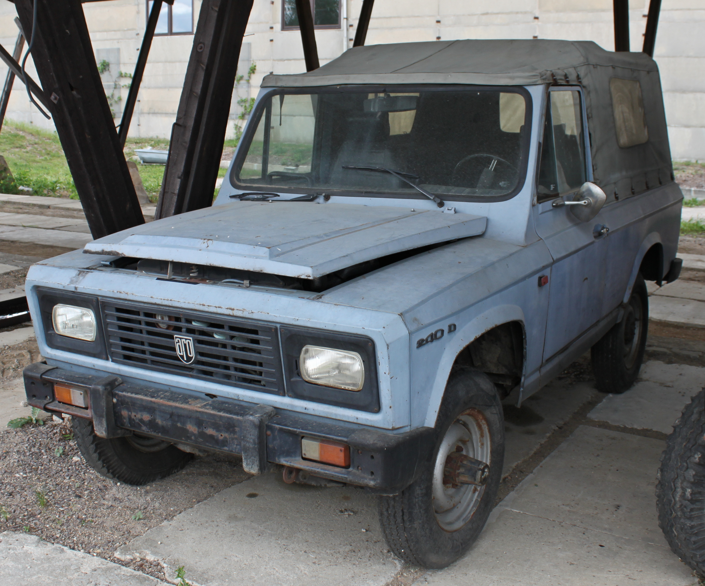 Aro 240 D